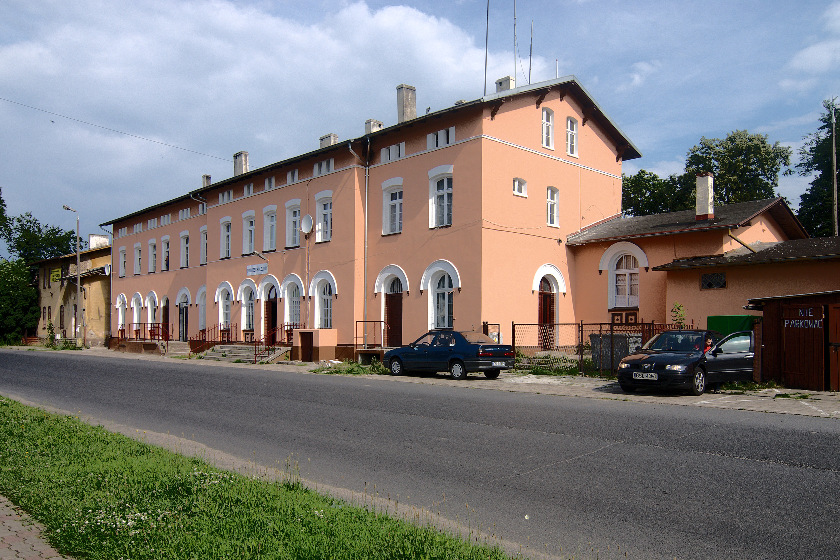 Dworzec PKP w Potęgowie.